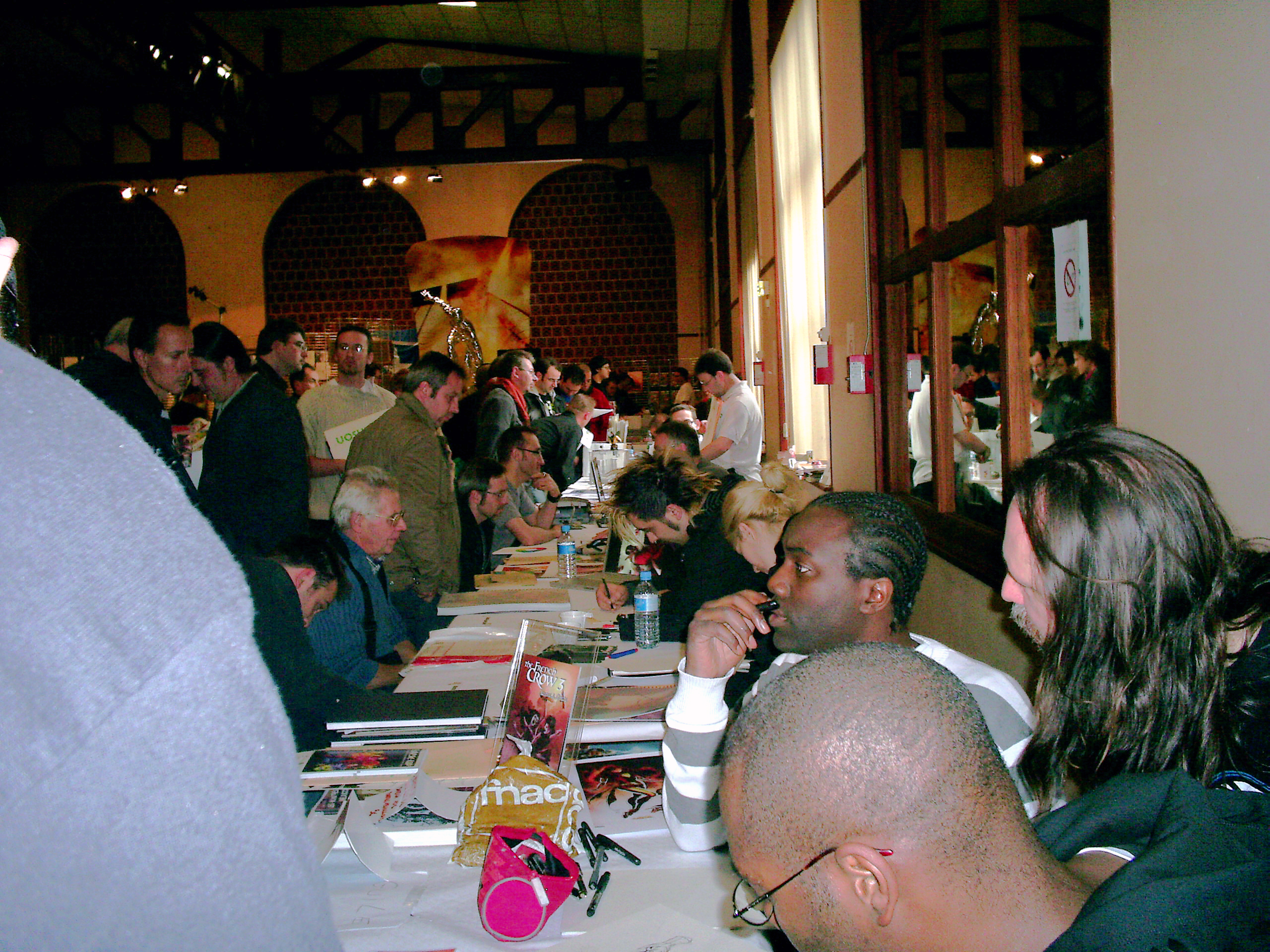 Vue d'une partie du Lille Comics Festival 2007 (prise le samedi 3 novembre 2007).